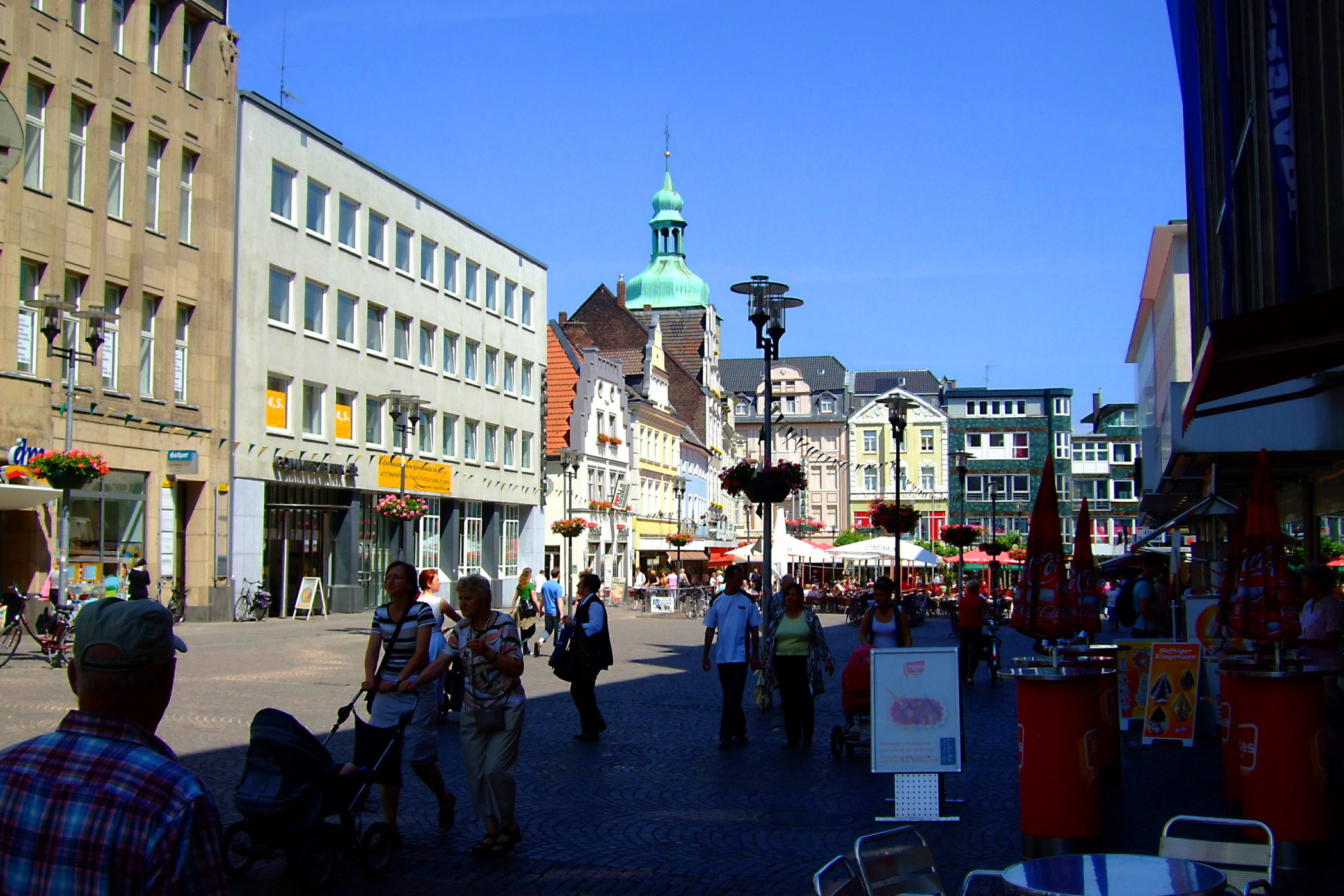 Markt, (NICHT der "Alte Holzmarkt") in Recklinghausen (NRW)